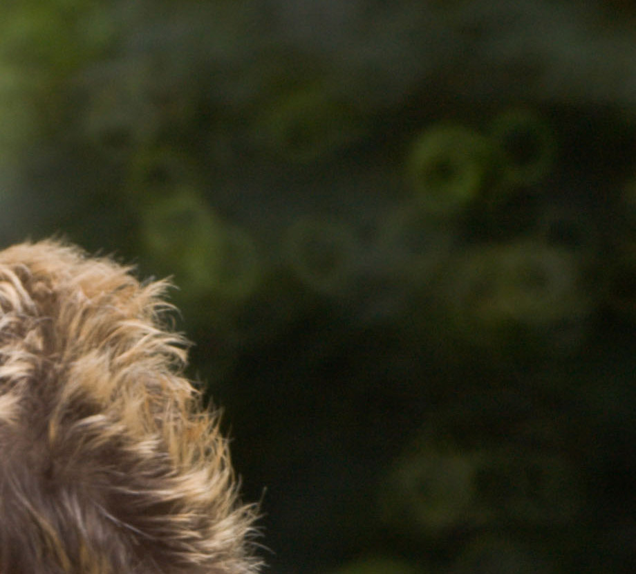 Typowy przyklad brzydkiego bokeh. Zdjęcie wykonano obiektywem lustrzanym MC 3M-5CA 500/8 Jasne punkty w tle przyjmują postać tarczek z ciemniejszym środkiem - obwarzanków. Jestem autorem tego zdjęcia - Andrzej Makarczuk.